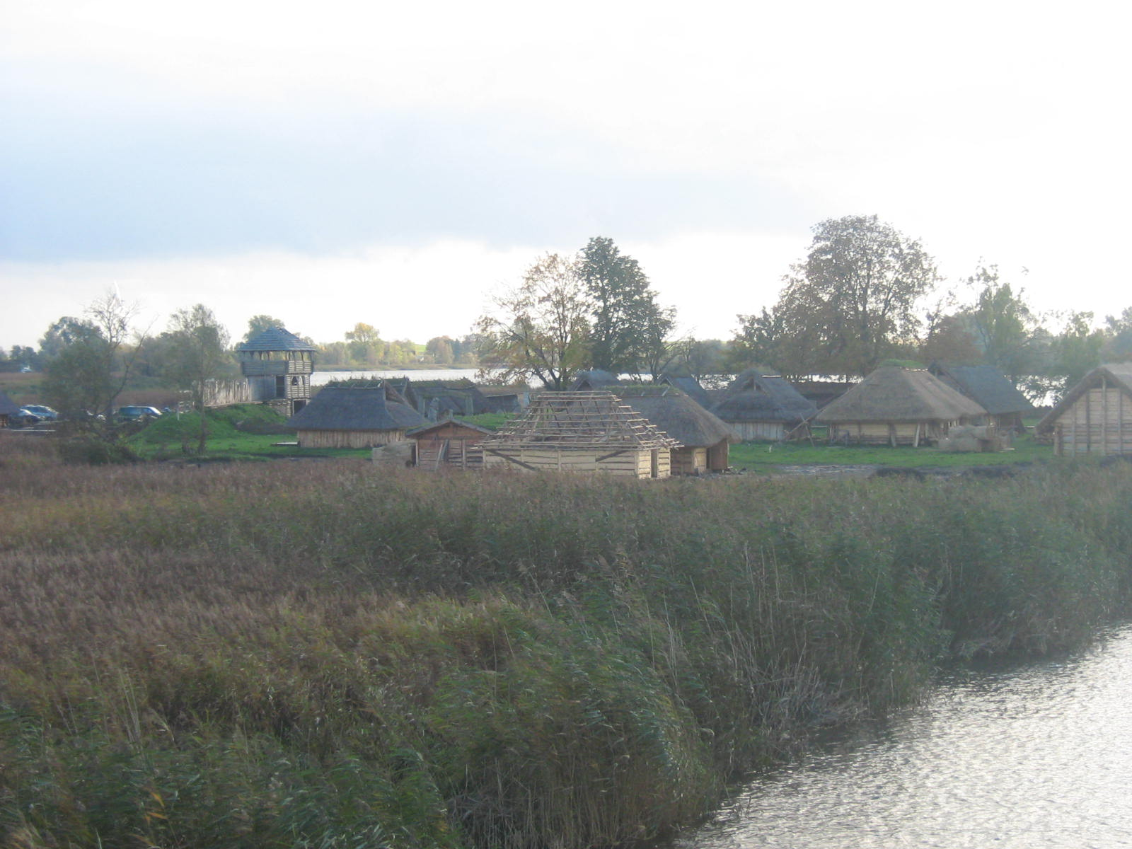 Skansen w Wolinie